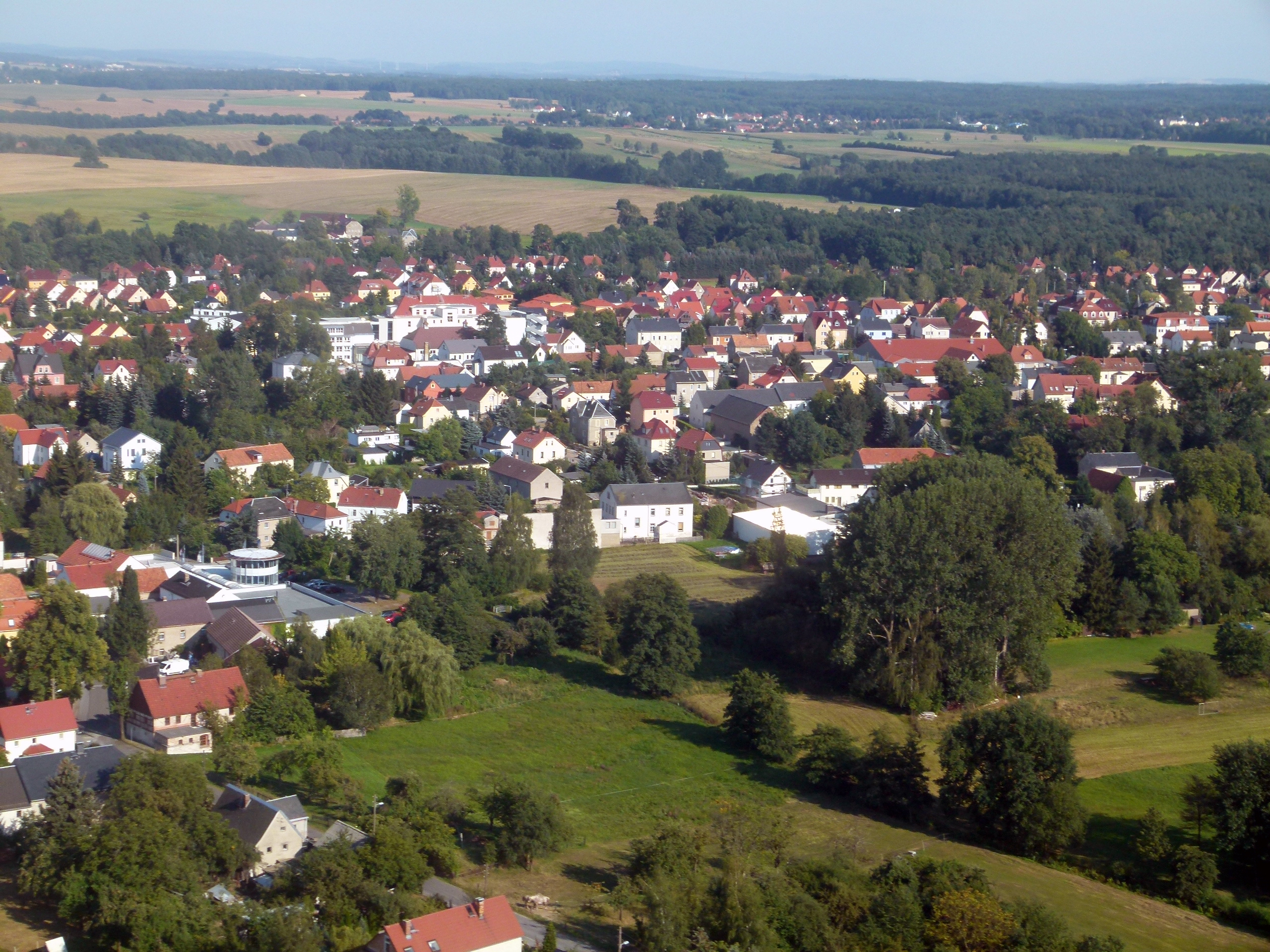 Blick auf den südlichen Teil der Dresdner Gemarkung Lausa